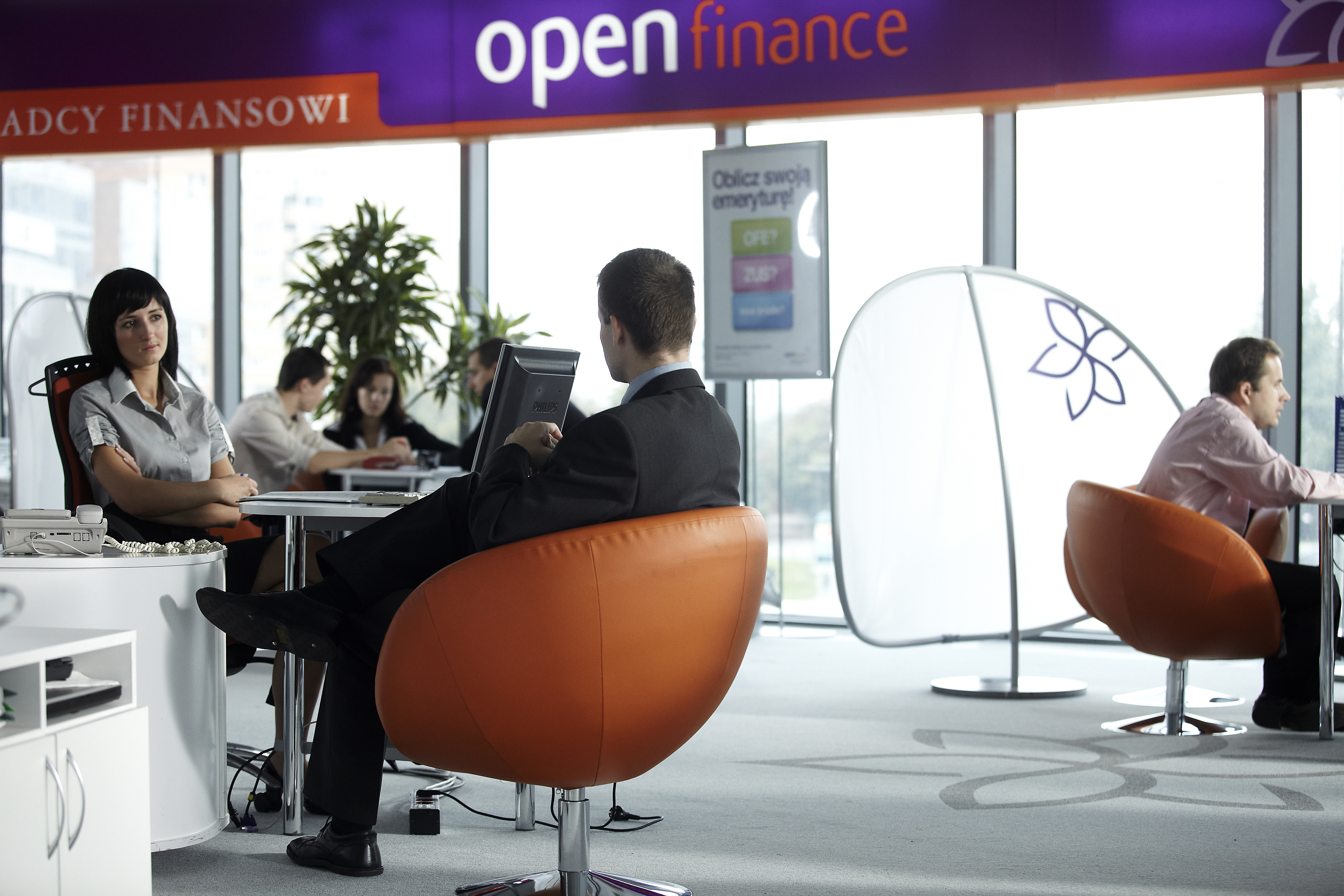 Wnętrze oddziału Open Finance.